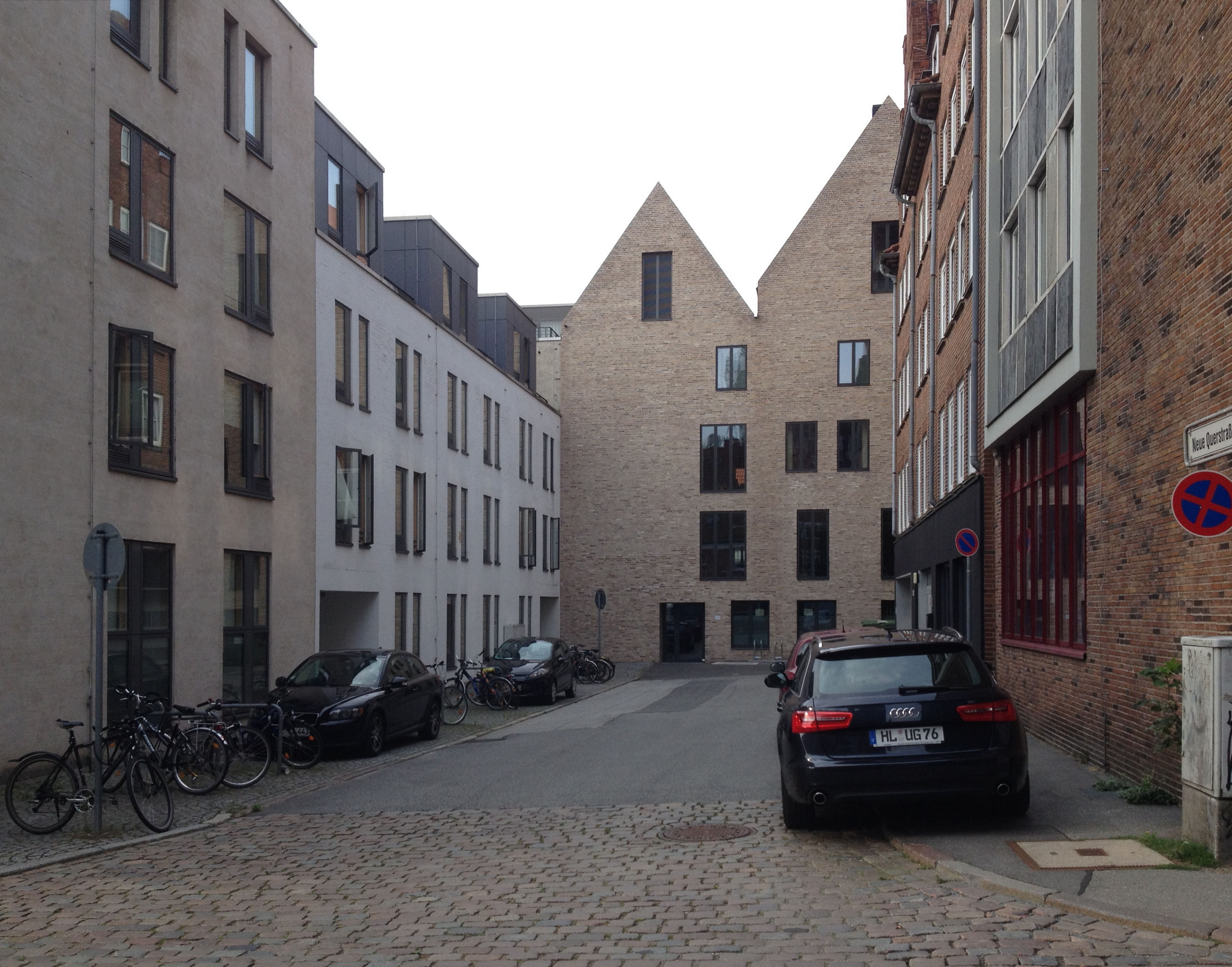 Die Neue Querstraße in Lübeck